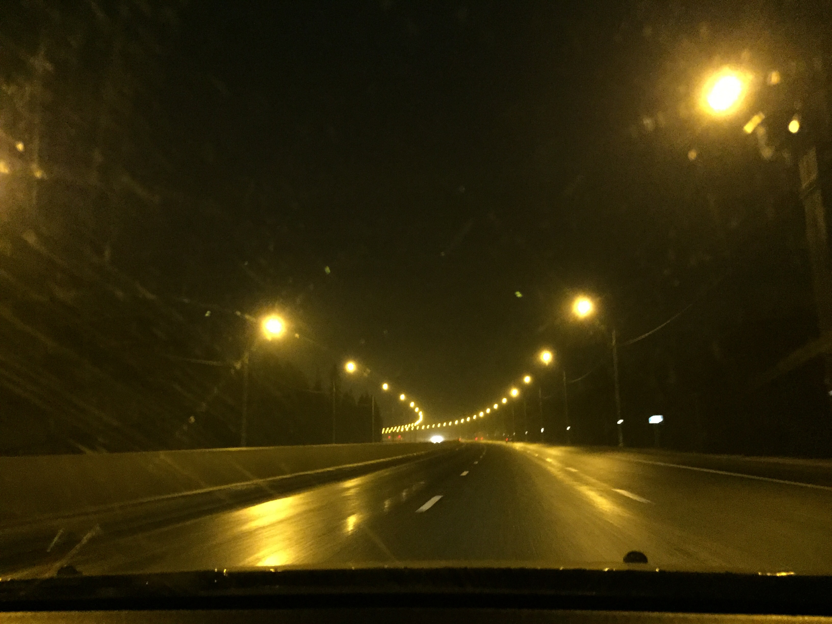 Е18 Скандинавия